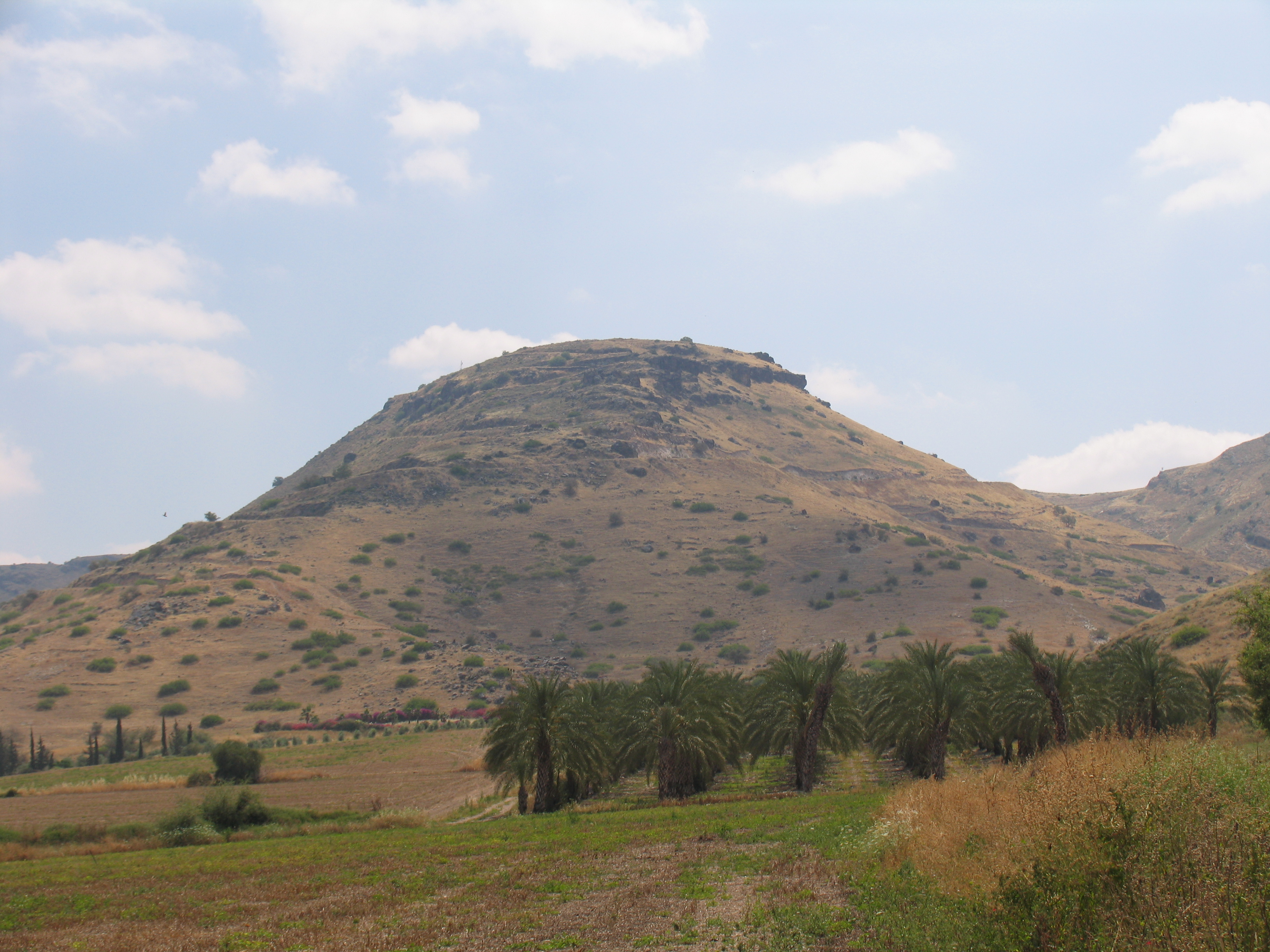 Hippos from Lake / Hippos od strony Jeziora Genezaret - z drogi do kibucu En Gev